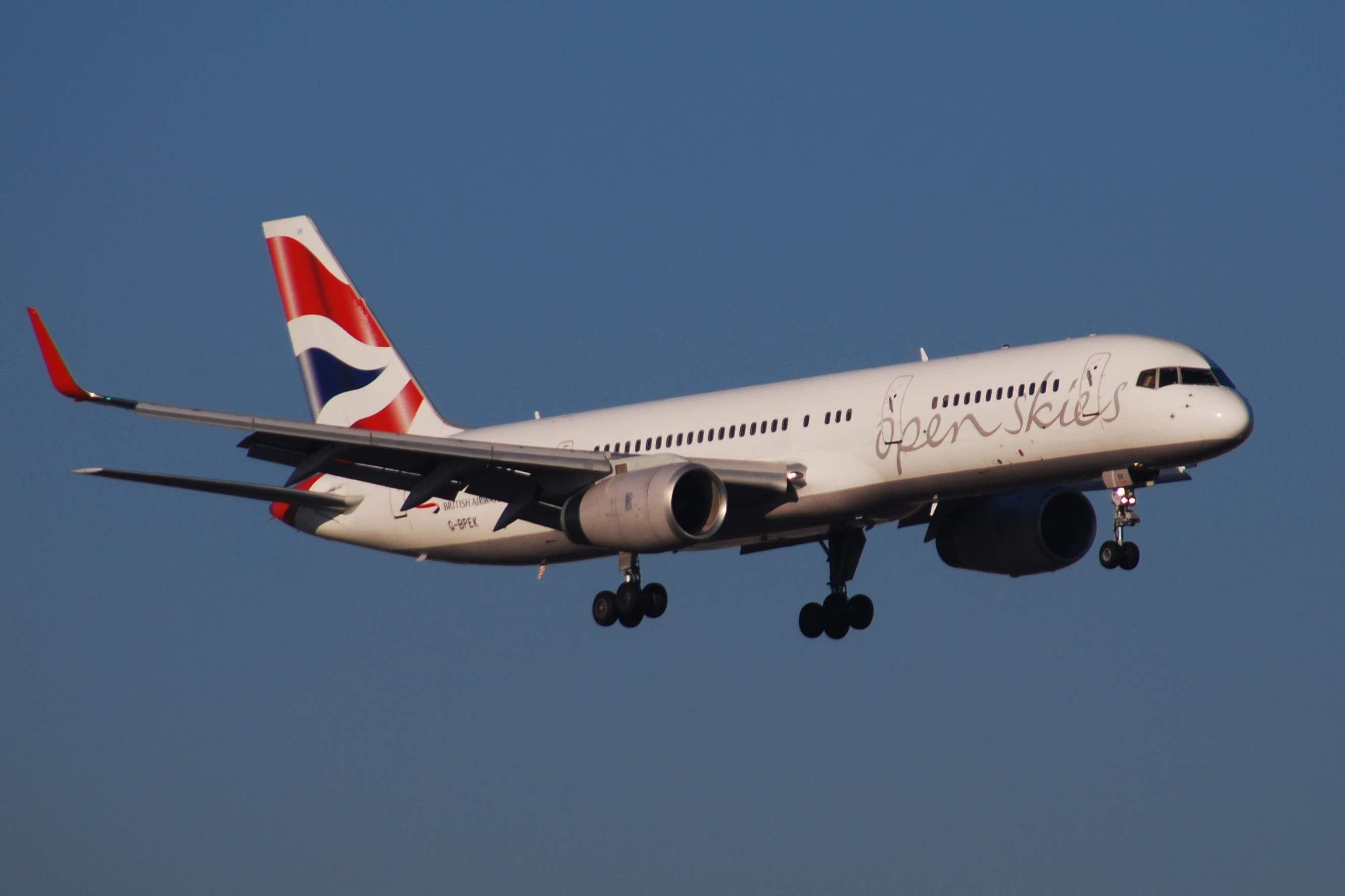 Photo prise à l'aéroport de Paris-Orly (LFPO) en France. Picture take at Paris-Orly Airport (LFPO) in France.